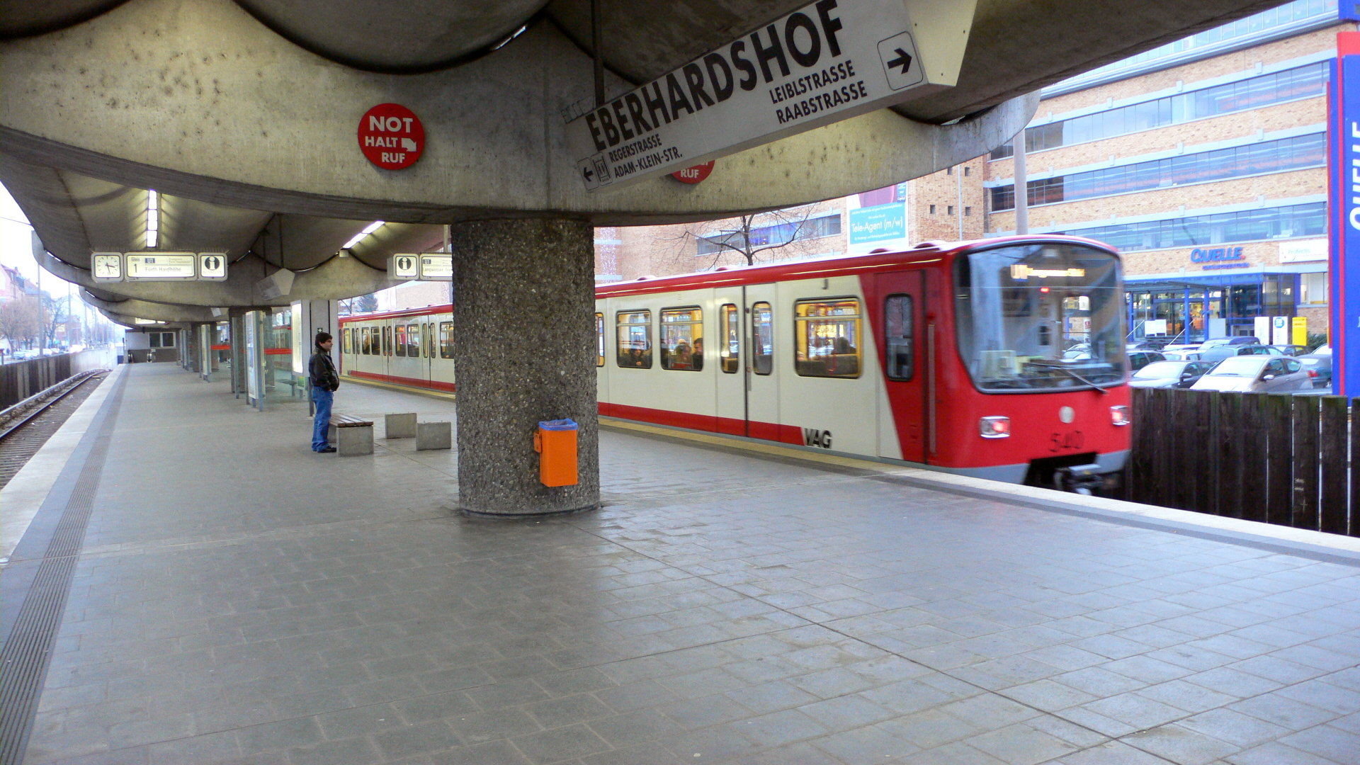 U-Bahnhof Eberhardshof der U-Bahn Nürnberg, Bahnsteigebene, Blick von Westen